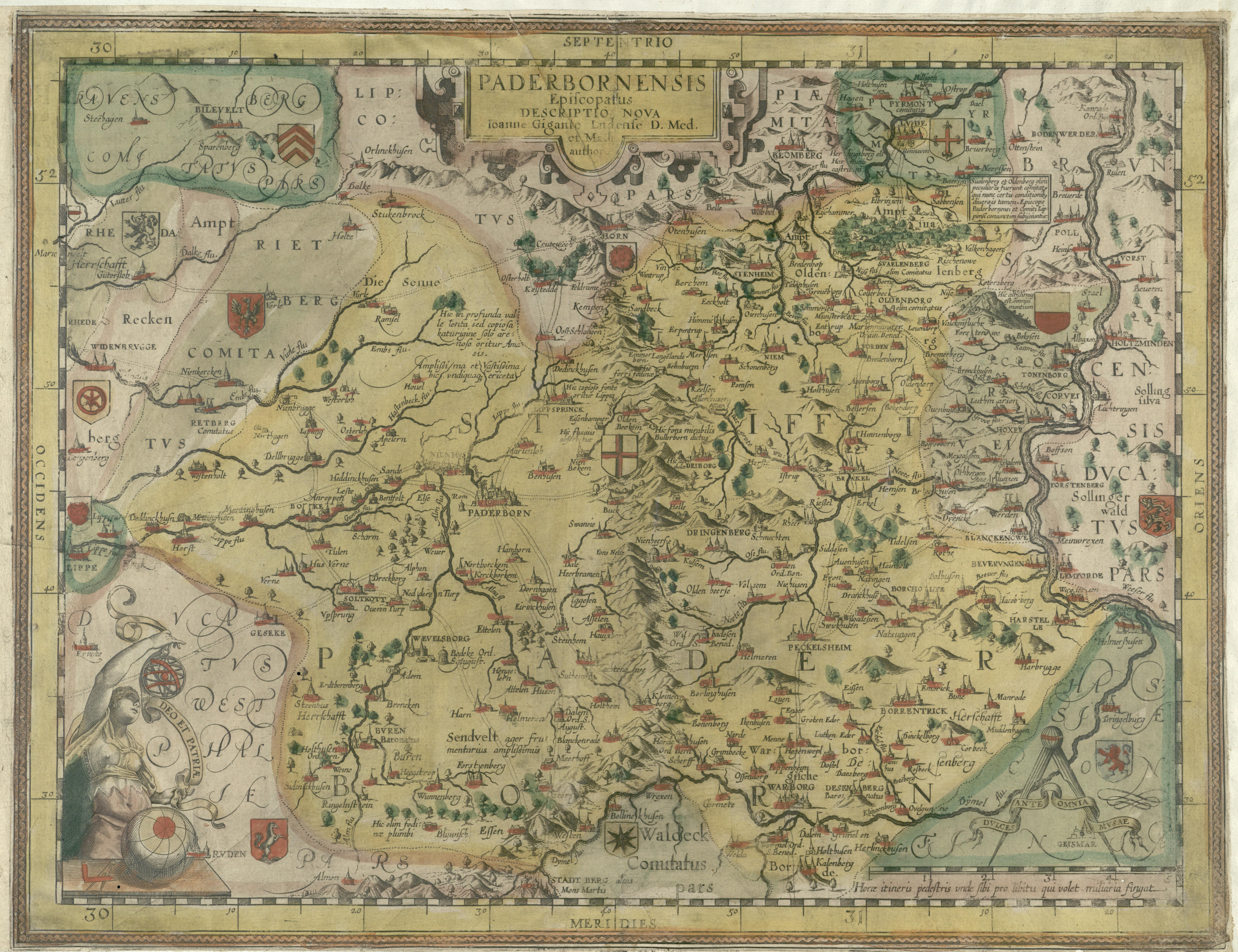 Karte des Fürstbistums Paderborn